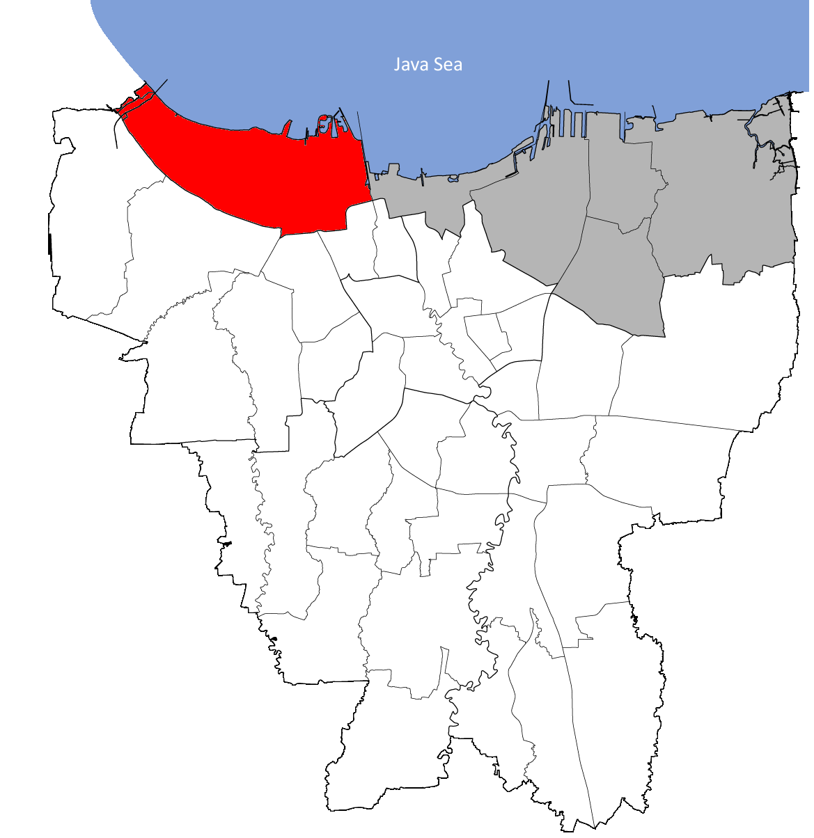 Penjaringan;onderdistrict (Kecamatan) van Noord-Jakarta